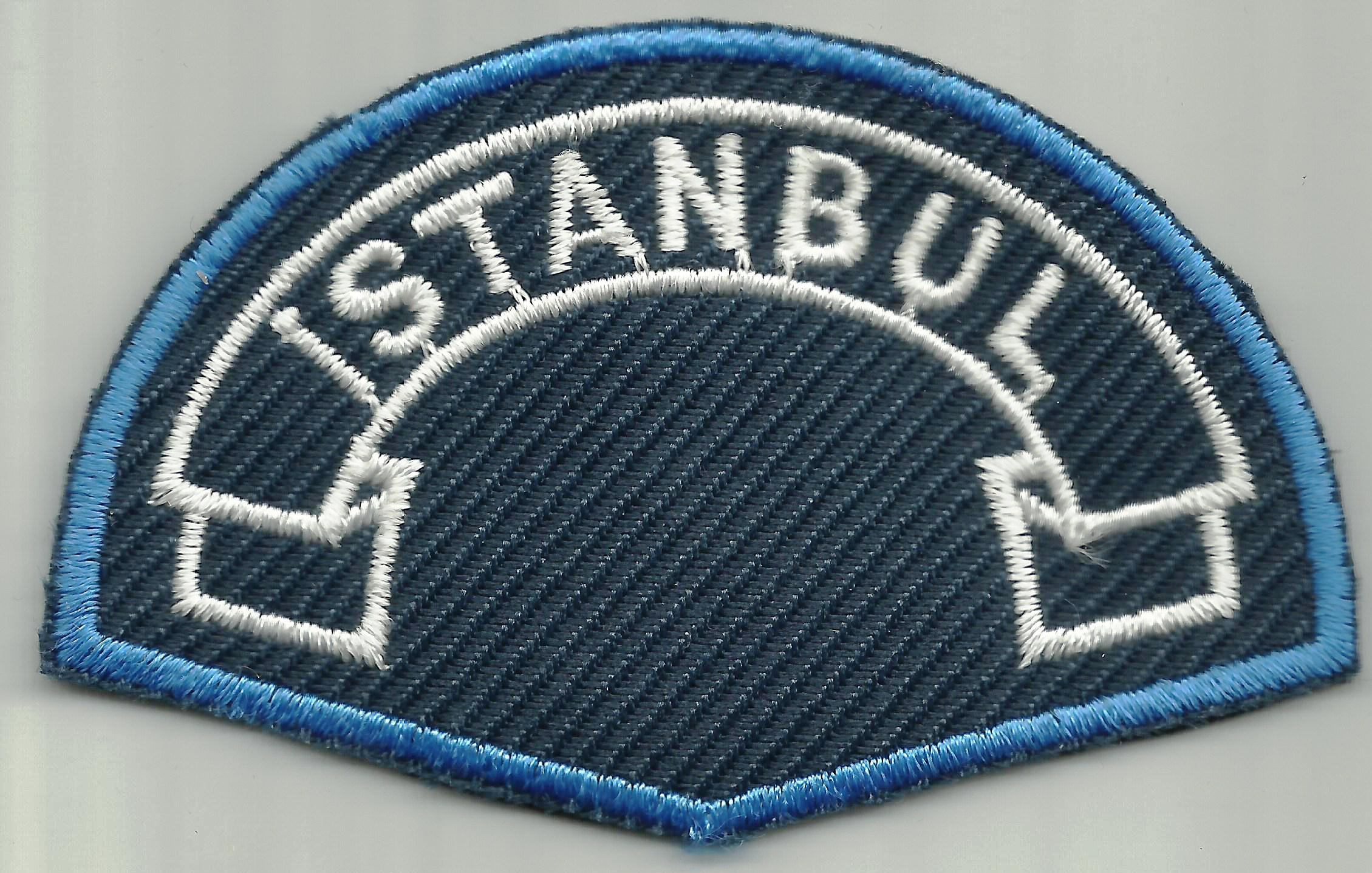 Turks politie embleem